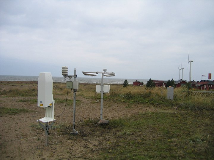 Osa Hailuodon Marjaniemen automaattista sääasemaa. Vasemmalla on Vaisala Oyj:n valmistama ceilometri (pilvenkorkeusmittari), sitten lämpötila-anturin säteilysuoja ja keskellä näkyvyysmittari. syyskesä 2003. Huom: Muista säilyttää viittaus kuvaajaan, mikäli käytät kuvaa.